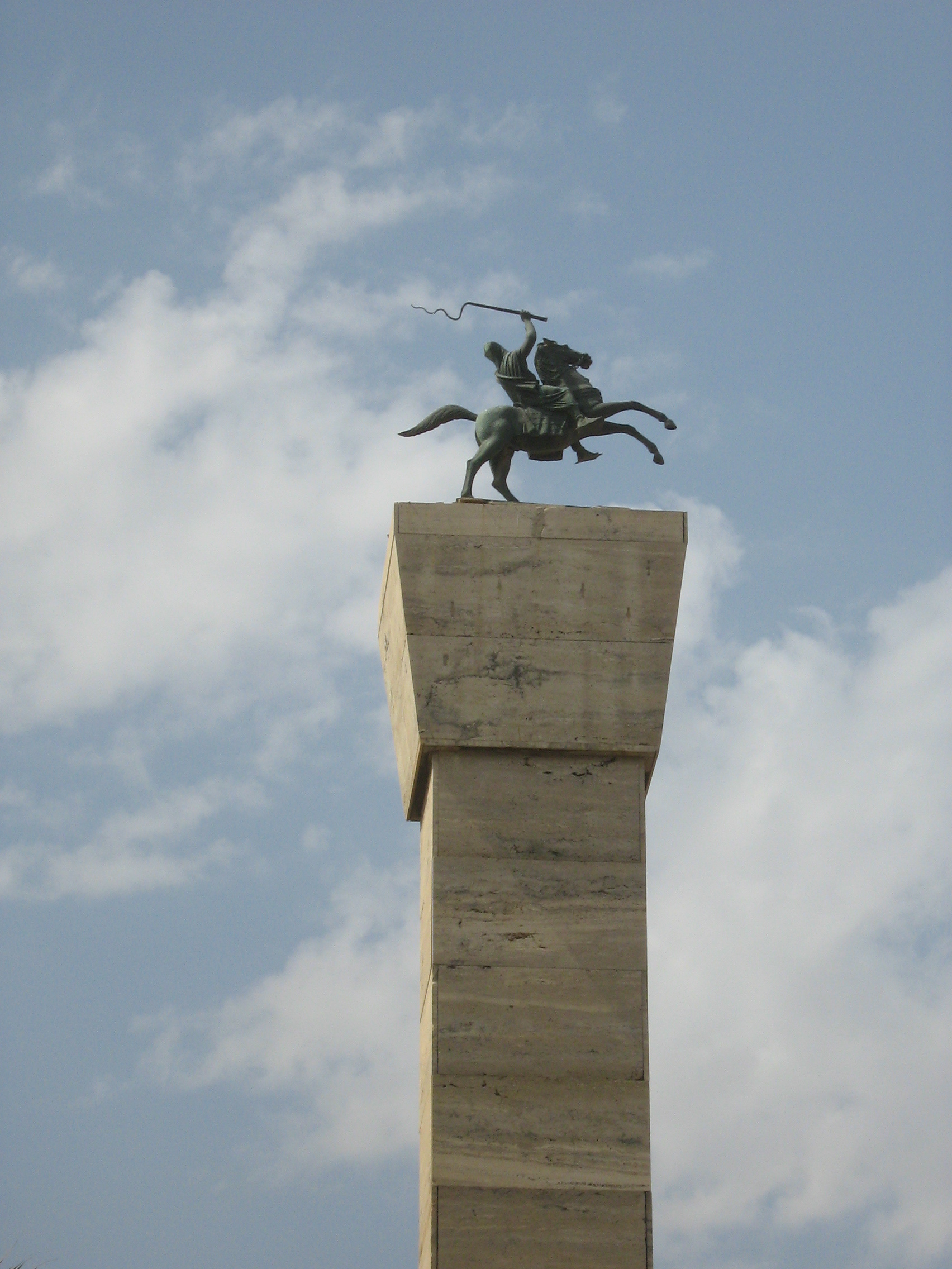 Всадник - символ города. Триполи.